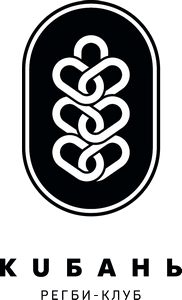 Официальный логотип регби-клуба "Кубань"